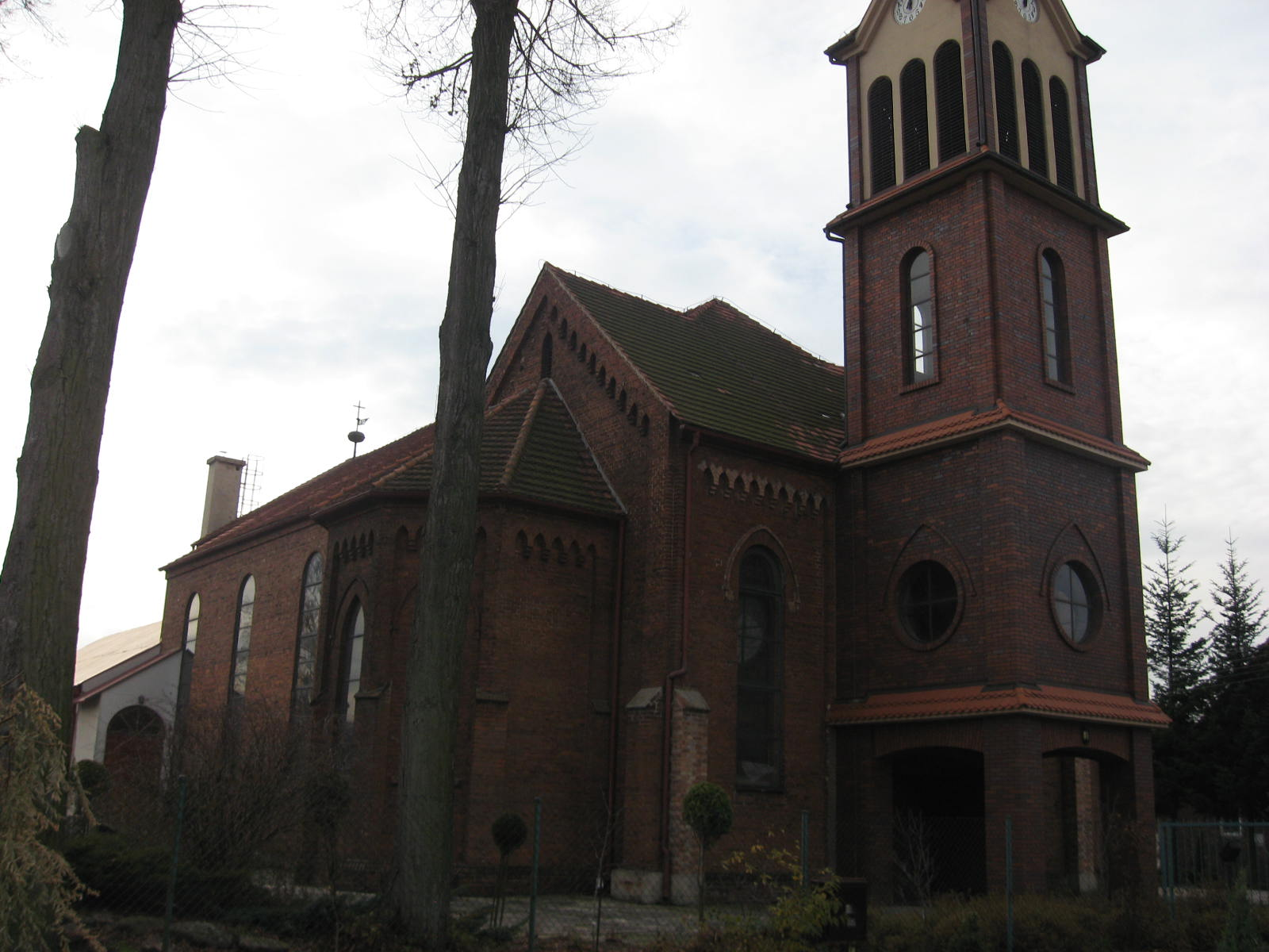 Widok od strony północnej